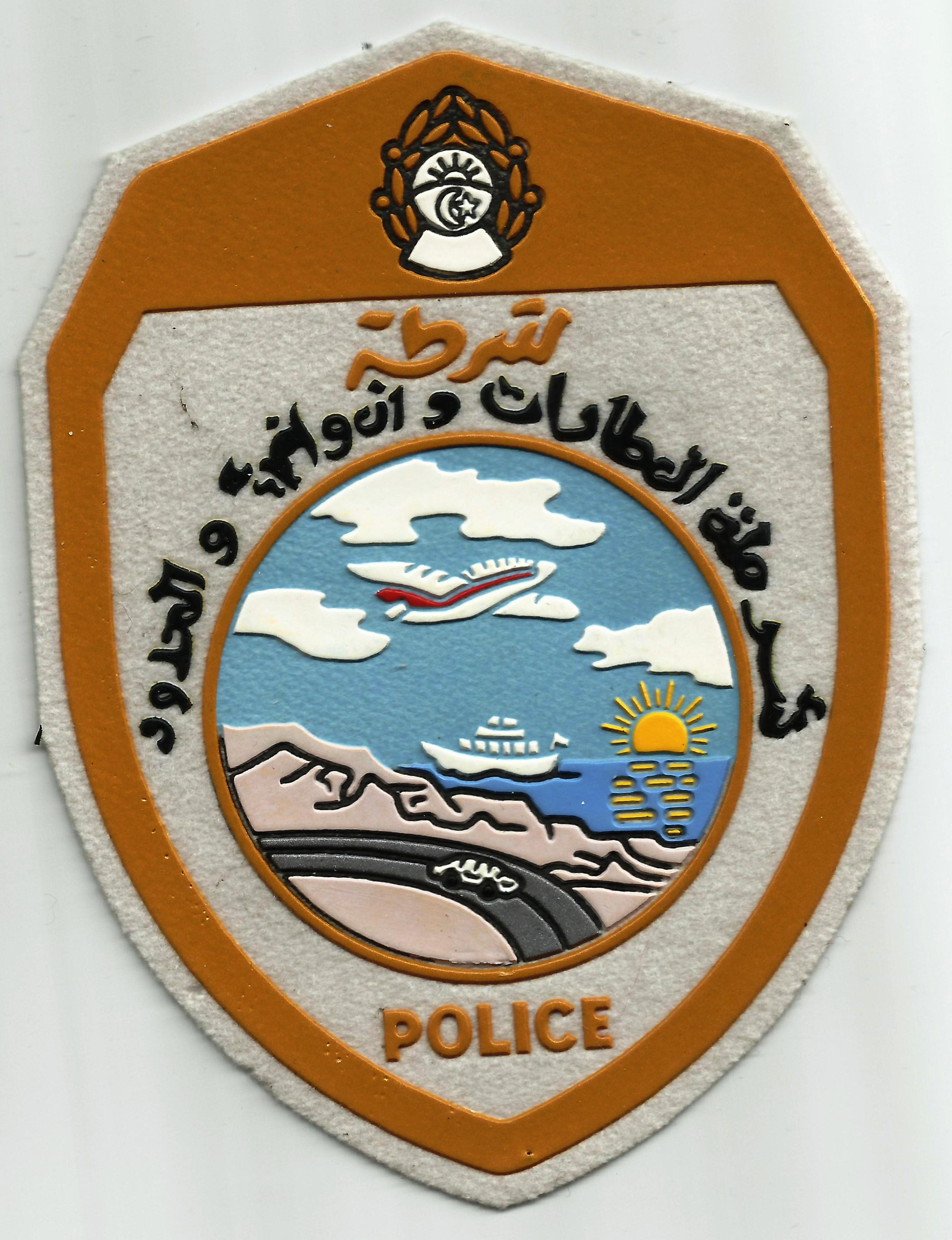 Politie patch uit Algerije